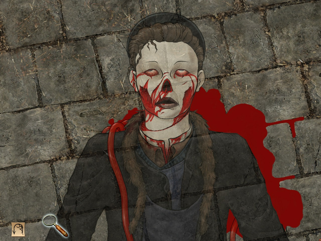 Capture d'écran du jeu Sherlock Holmes contre Jack l'Éventreur. Il s'agit d'un dessin du visage de Catherine Eddowes après son agression par "Jack l'Éventreur". Le détective interprétera les différentes blessures du visage comme étant une manière de recréer le visage émacié et difforme d'un enfant atteint de syphilis.